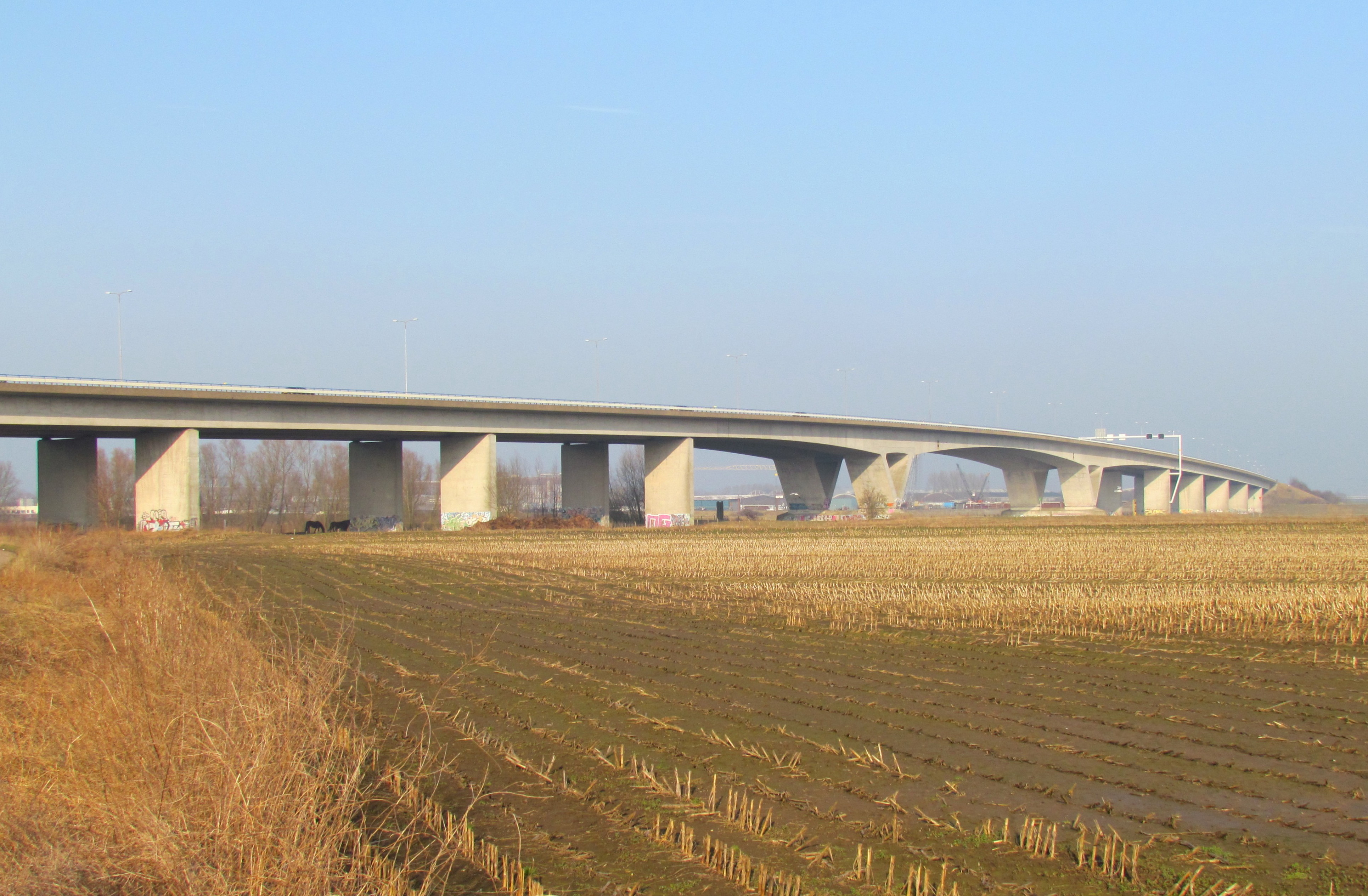 De Andrej Sacharovbrug bij Arnhem in 2015